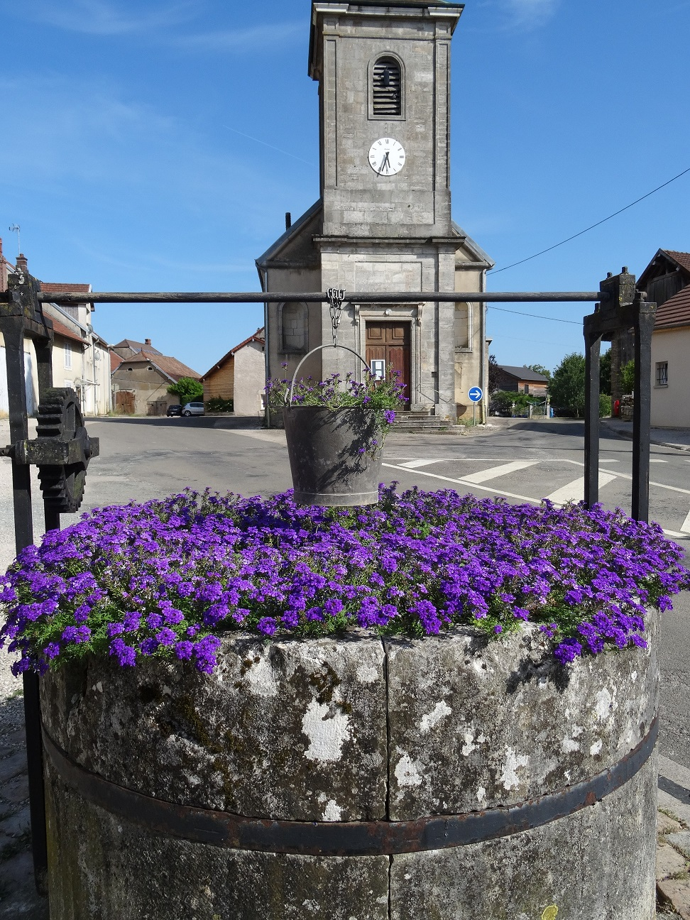 Puits fleuri avec église en arrière plan à Pouilley-Français (Doubs, France).